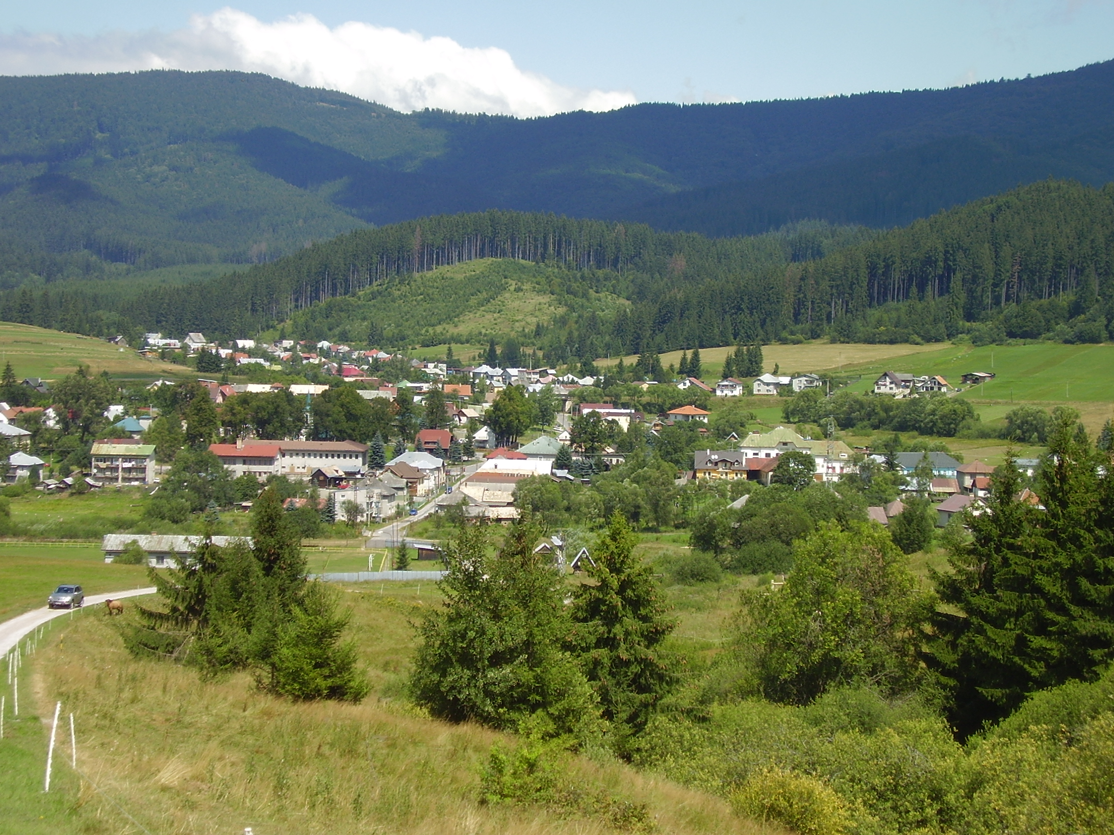 Muránska planina, okres Brezno, Slovakia